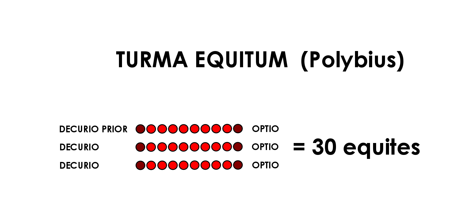 Turma di cavalleria (esercito romano) di 30 equites